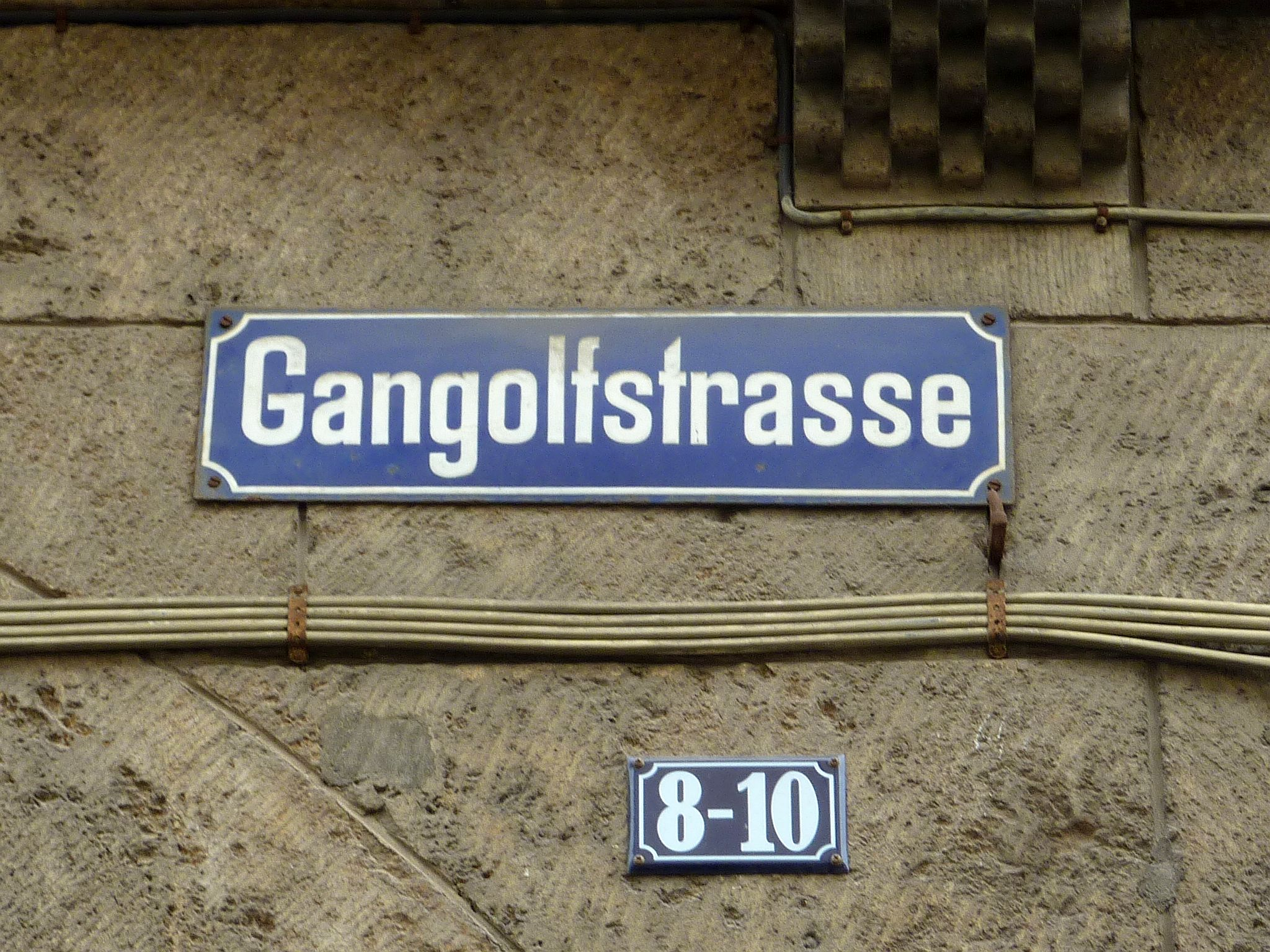 Bonn, Straßenschild in Erinnerung an die alte Pfarrkirche St. Gangolf.